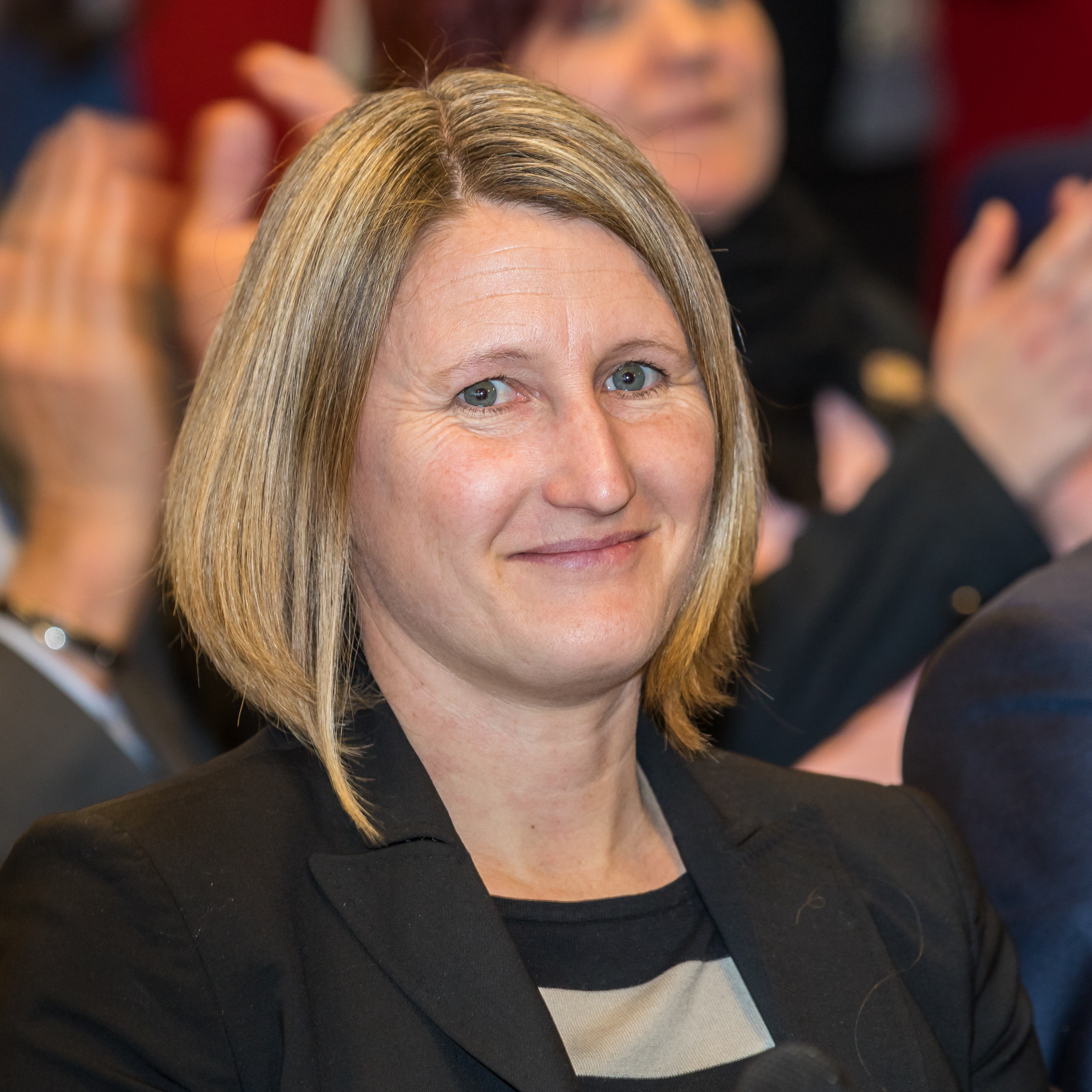 Pressekonferenz Kölner Sportjahr 2019 im Rheinenergiestadion Köln Foto: Sonja Fuss, Sportbotschafterin für Köln und ehemalige deutsche Fußballspielerin